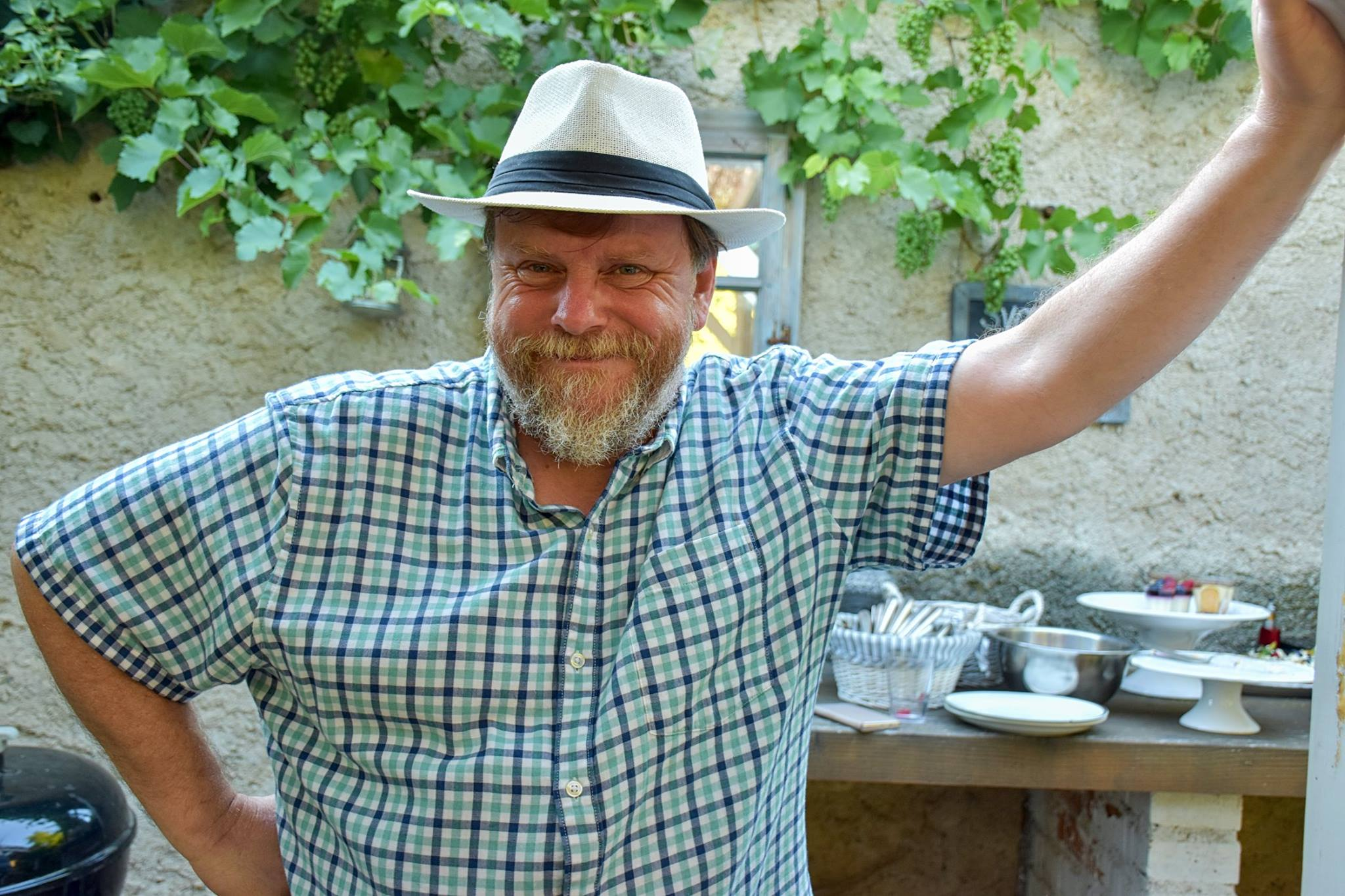 Rostislav Křivánek na faře v obci Kmetiněves r. 2019